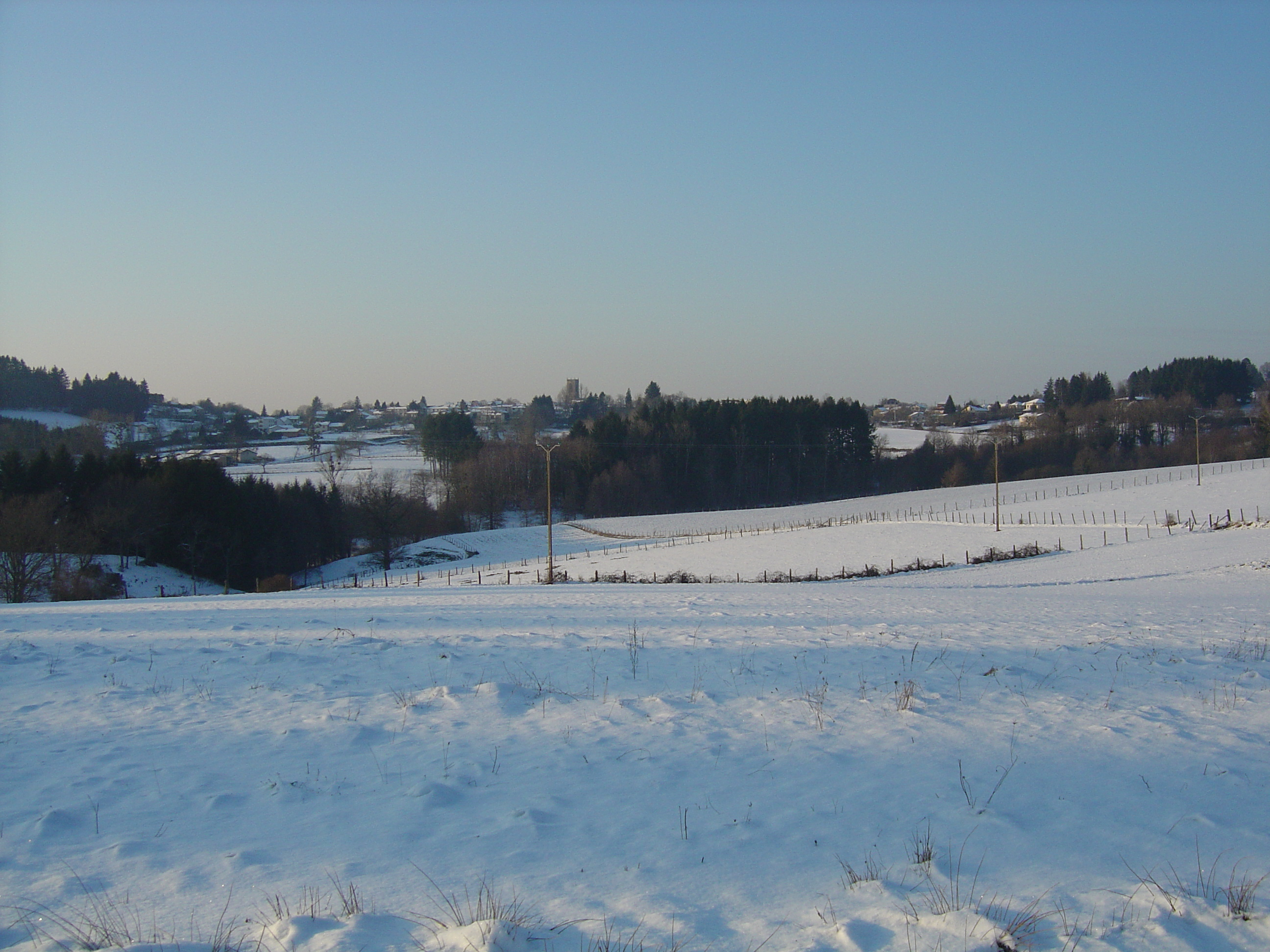 Vue générale d'Augerolles